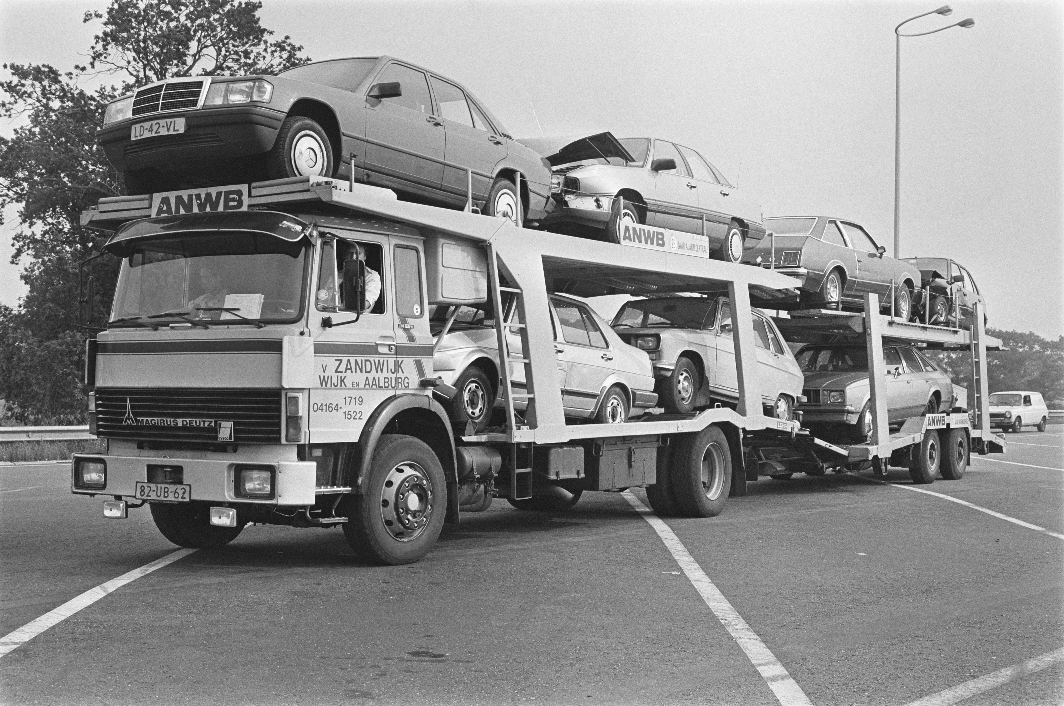 Collectie / Archief : Fotocollectie Anefo Reportage / Serie : [ onbekend ] Beschrijving : 8-lader ANWB-alarmcentrale terug in Nederland Datum : 8 augustus 1984 Instellingsnaam : ANWB Fotograaf : Bogaerts, Rob / Anefo Auteursrechthebbende : Nationaal Archief Materiaalsoort : Negatief (zwart/wit) Nummer archiefinventaris : bekijk toegang 2.24.01.05 Bestanddeelnummer : 933-0469